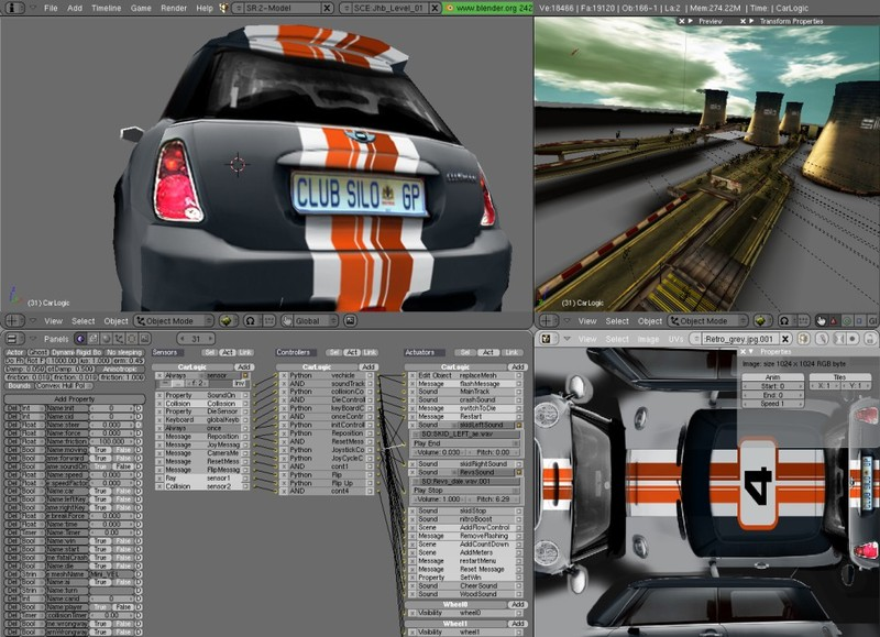 blender bge